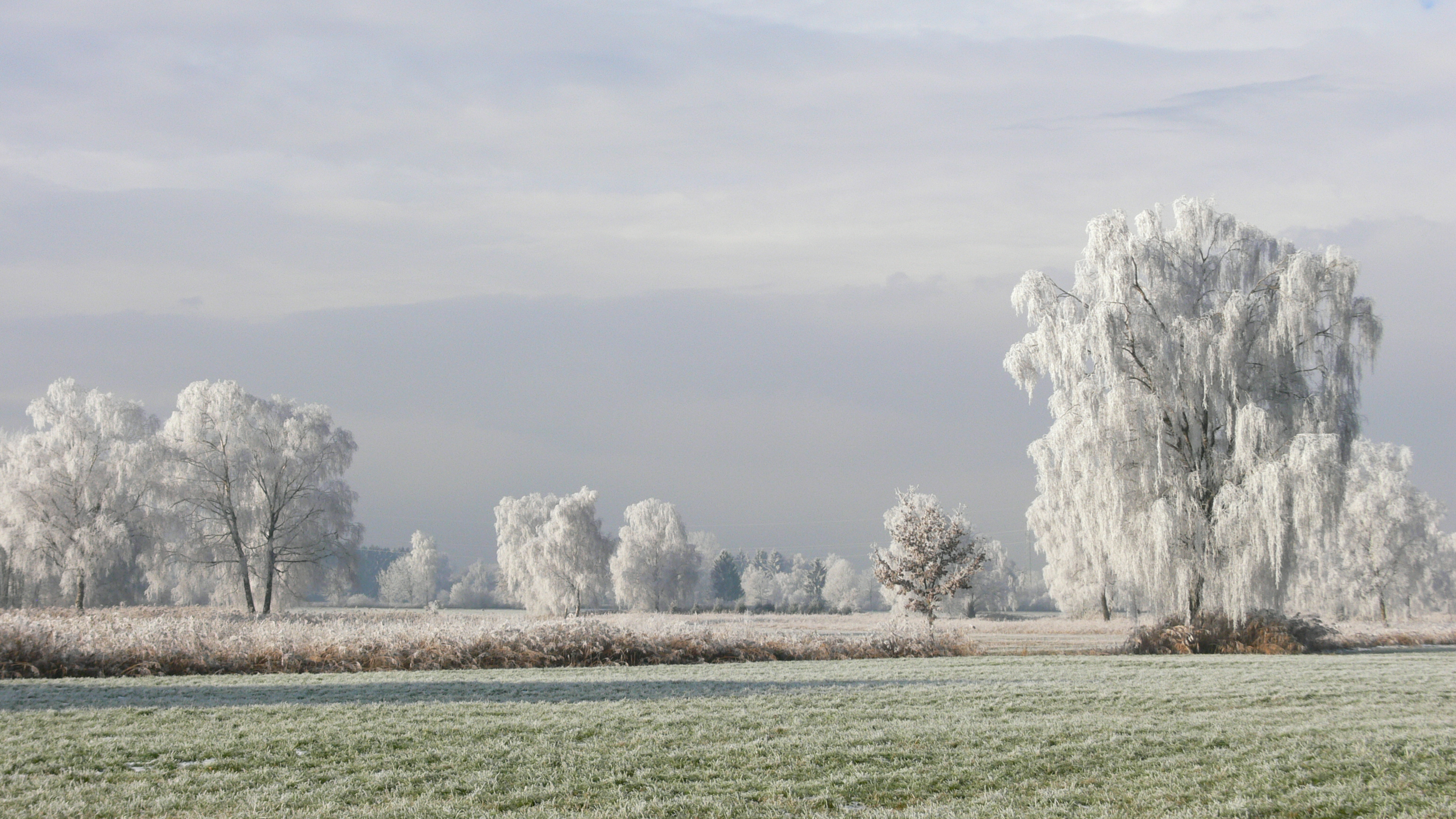 Raureif im Schweizer Ried in Lustenau nahe der Dornbirner Ach